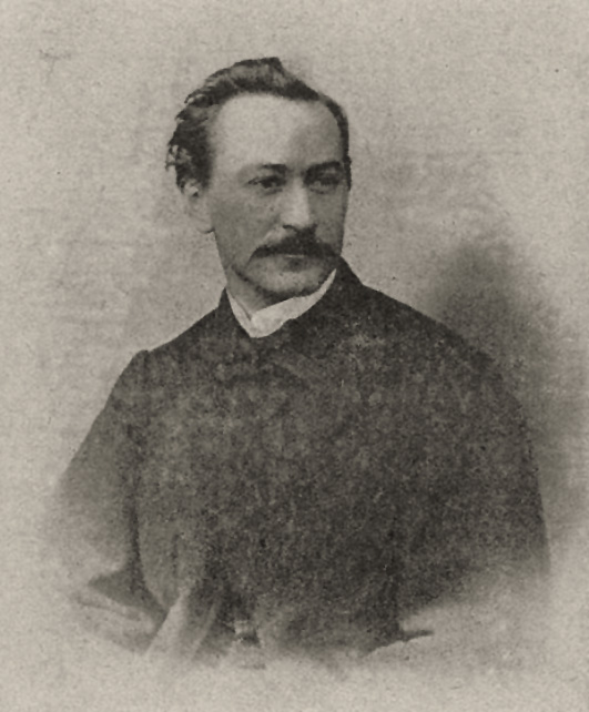 Albert Arnz, Landschaftsmaler in Düsseldorf, feiert am 24. Januar 1912 seinen 80. Geburtstag. Die Aufnahme zeigt den Künstler im 53. Lebensjahr